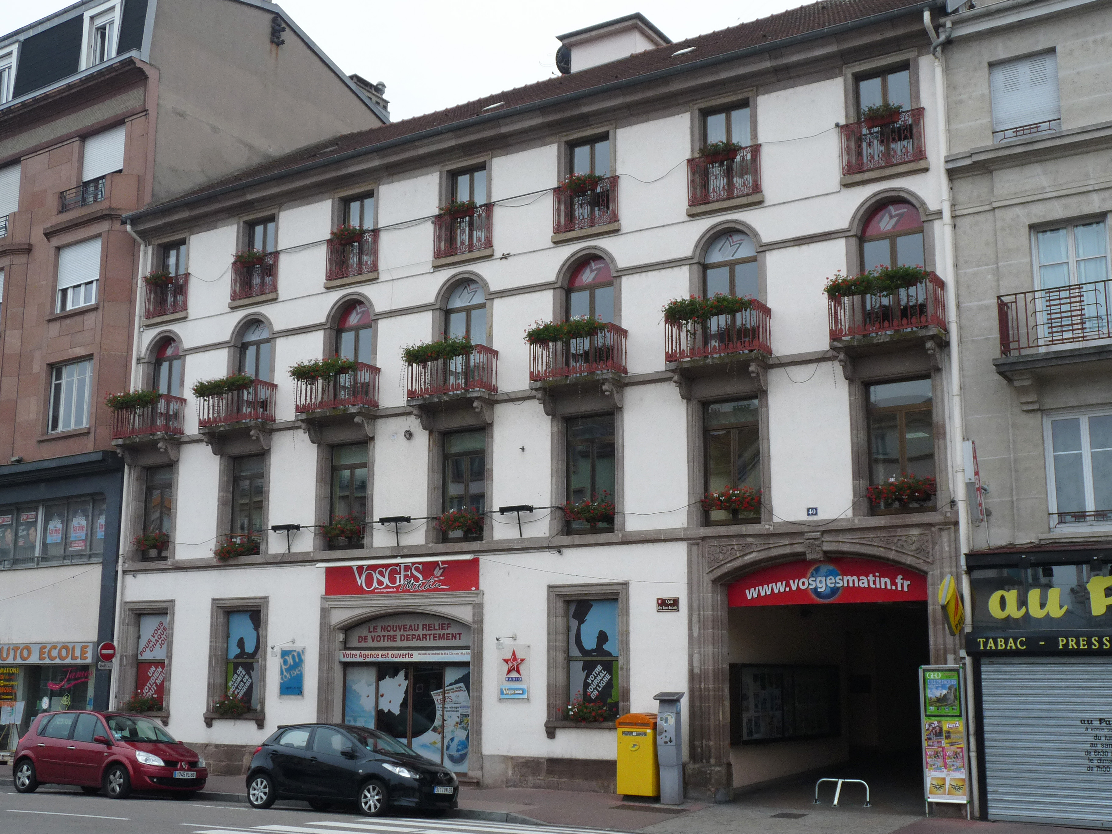 Epinal, 40 quai des Bons-Enfants : siège du quotidien régional Vosges Matin